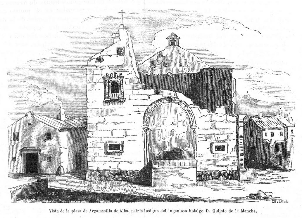 Vista de la plaza de Argamasilla de Alba, patria insigne del ingenioso hidalgo D. Quijote de la Mancha.